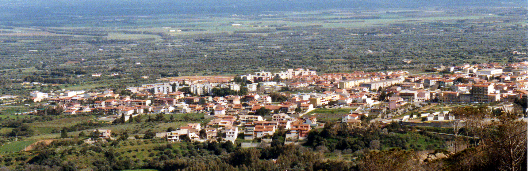 Auteur:Yugiz Vue de la commune de Villacidro en Sardaigne.